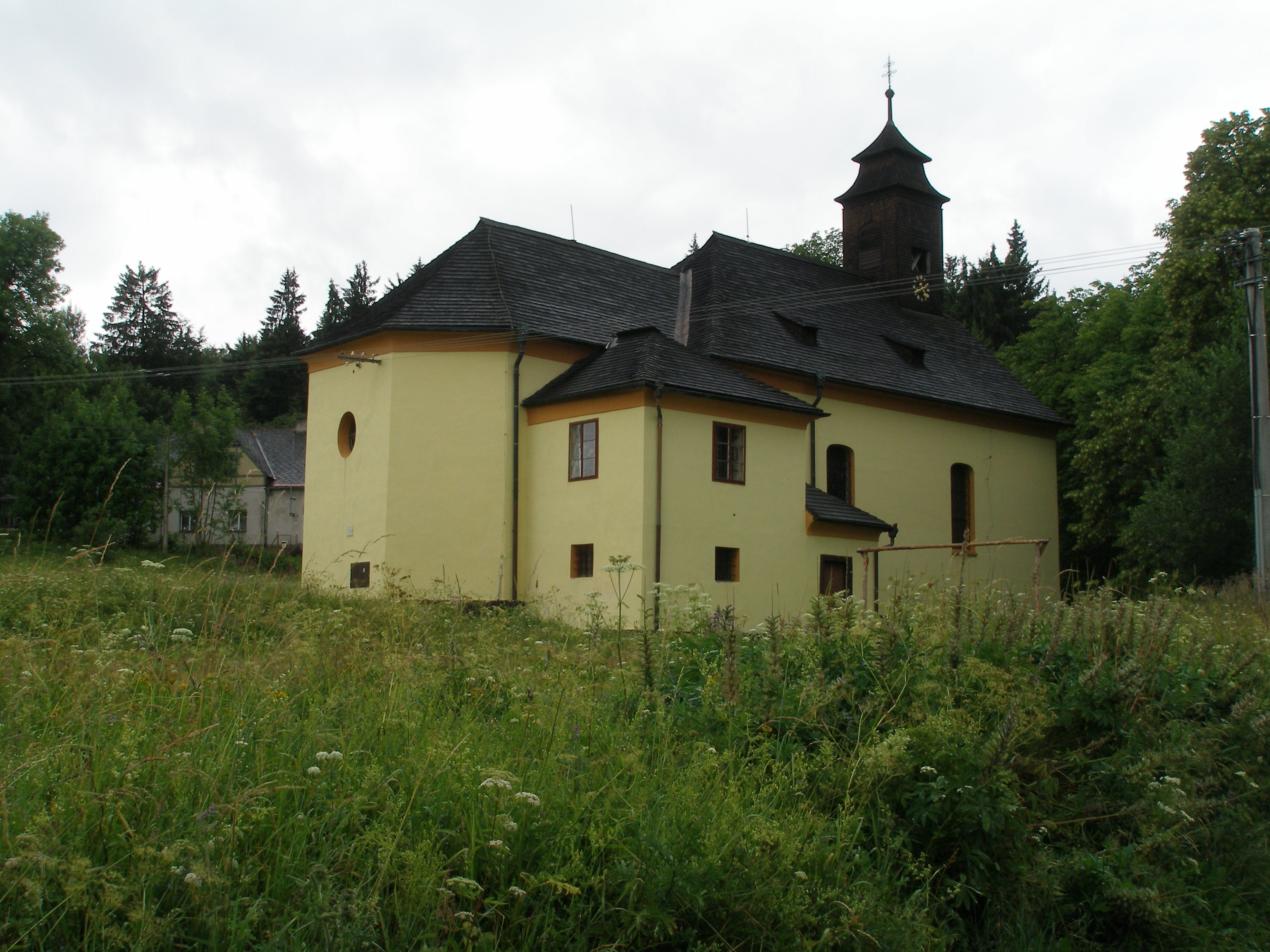 Křišťanov - kostel od severovýchodu